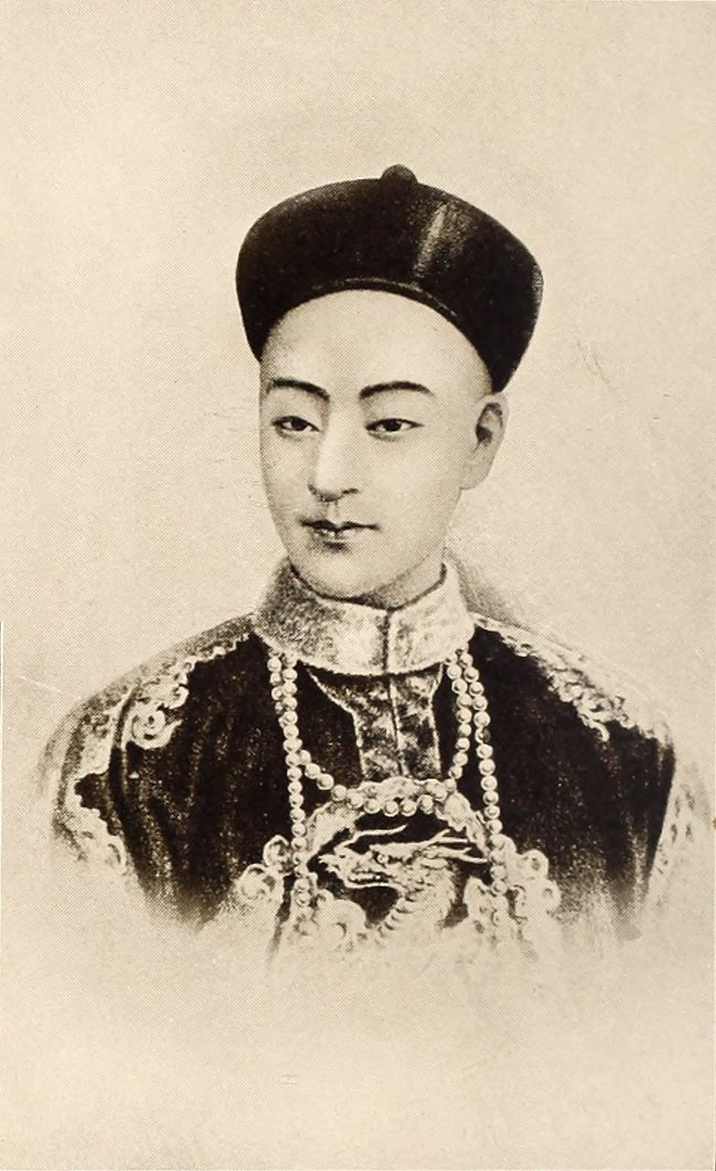 תמונה של הקיסר הסיני גואנג סו